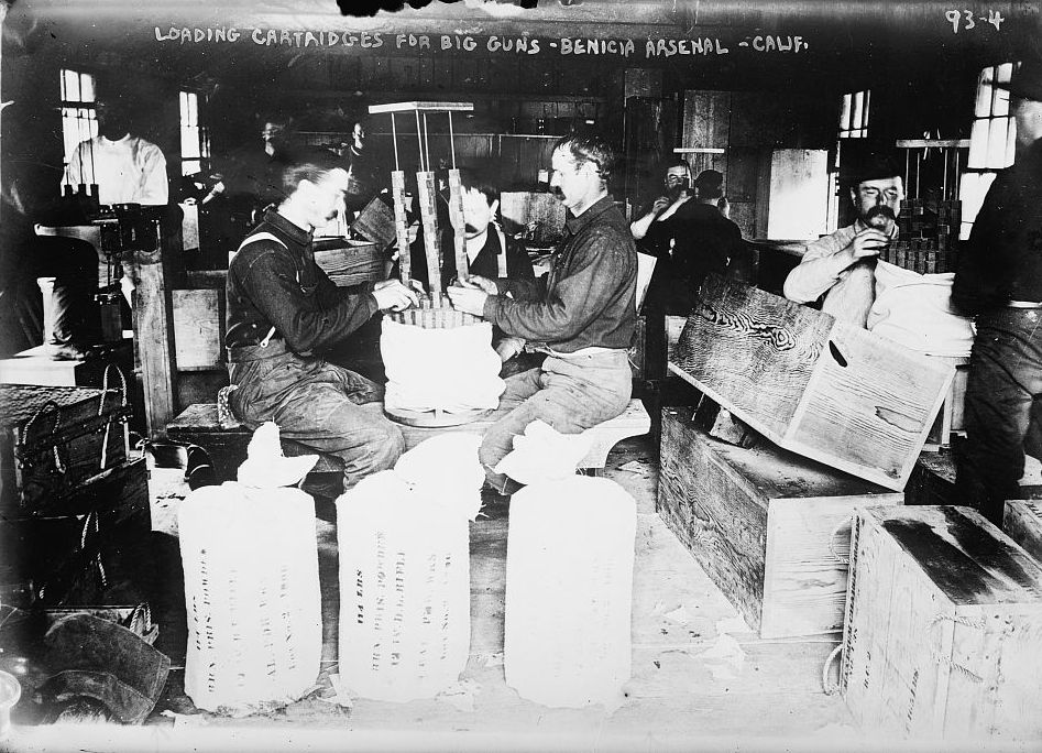 Loading cartridges for big guns Benicia Arsenal, Benicia, California, USA